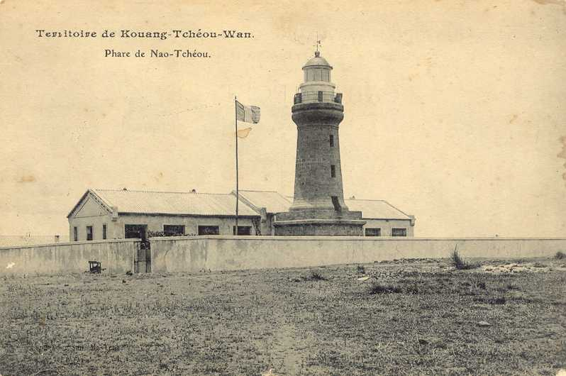 Phare de Nao-Tchéo (Nǎozhōu), Kouang-Tchéou-Wan (aujourd'hui Zhànjiāng, Guangdong, Chine), en 1905.